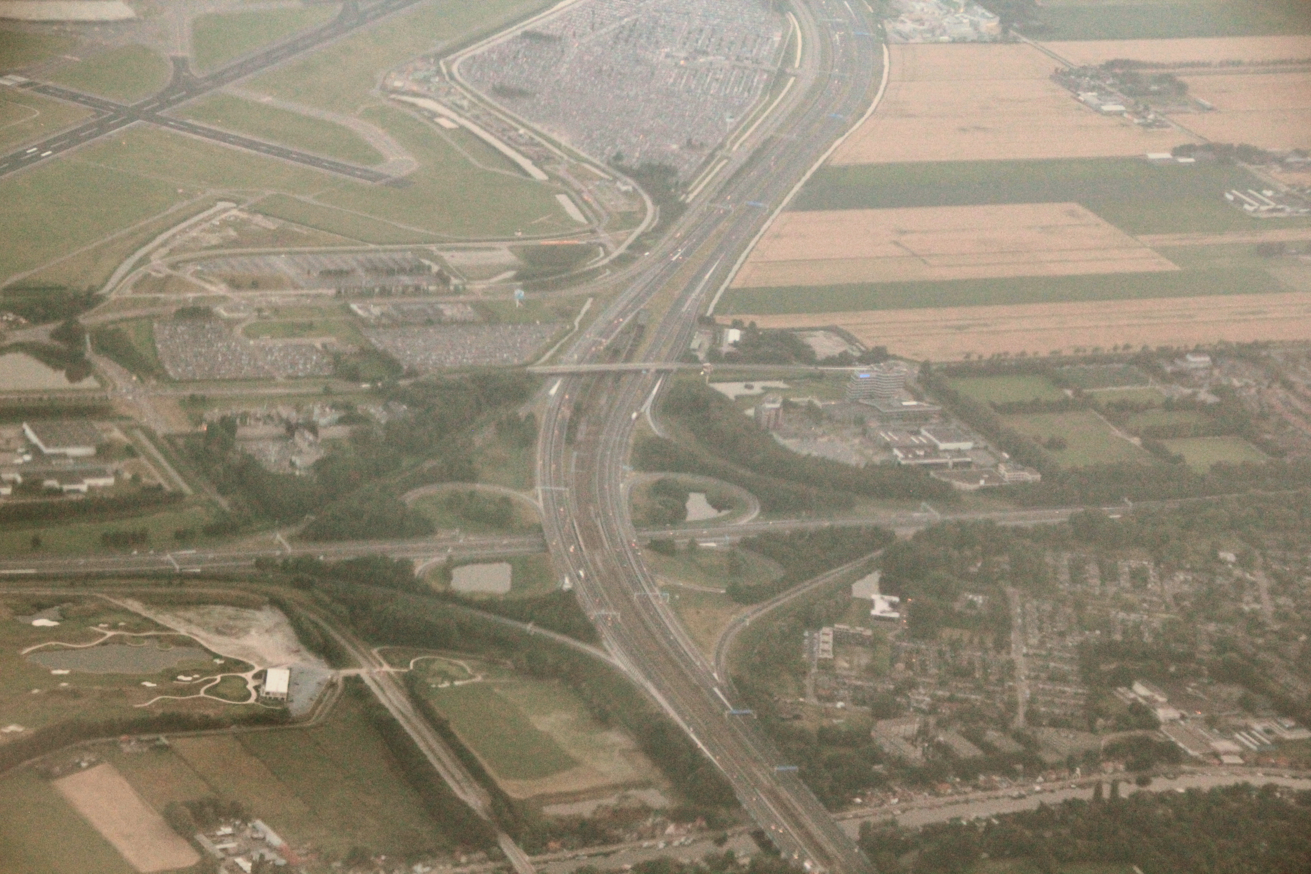 Knooppunt Badhoevedorp, gezien naar het zuidoosten, met op de voorgrond het Ringvaartviaduct en de Oude Haagsebrug (middenonder) nog net zichtbaar. Augustus 2013